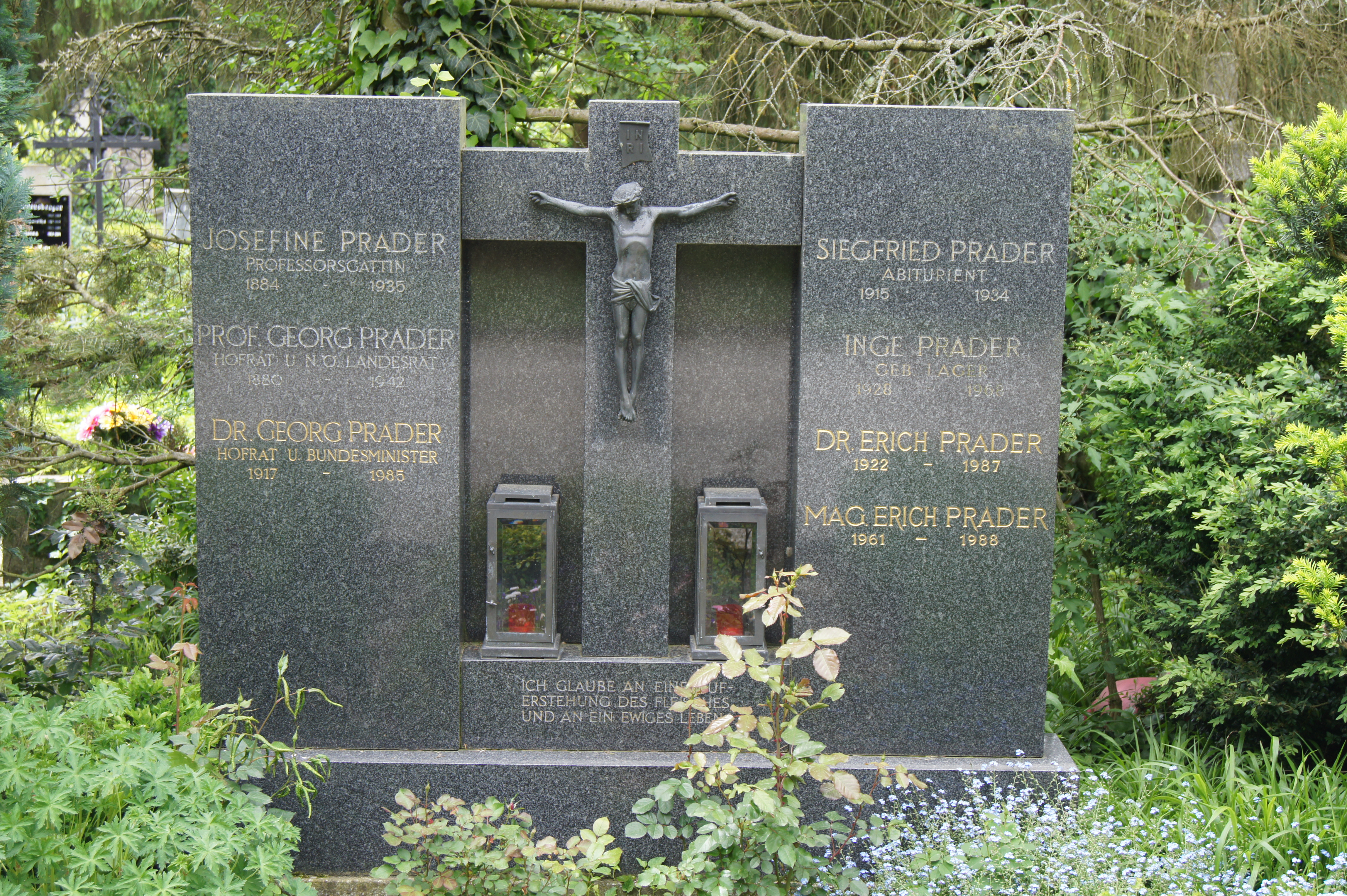 Städtischer Hauptfriedhof, Pradergrab